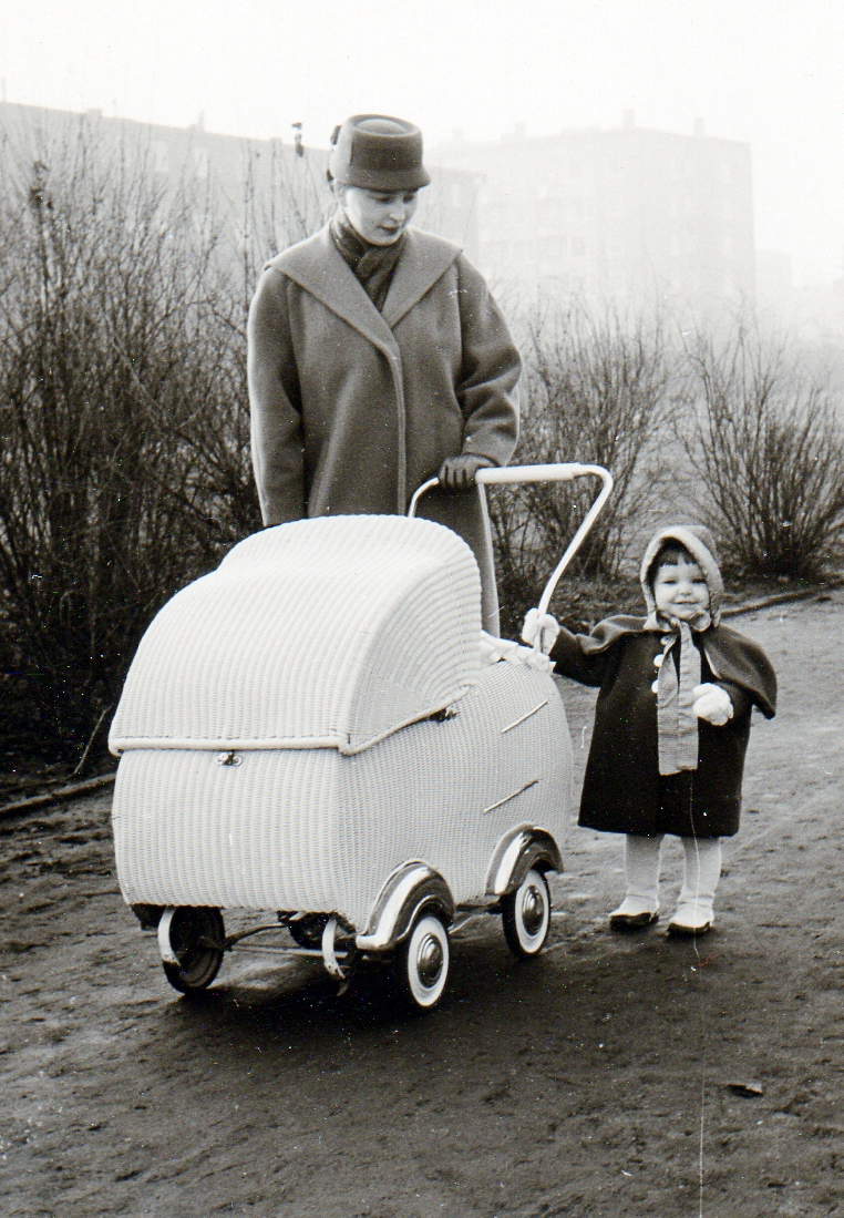 Kinderwagen, Hamburg 50er Jahre